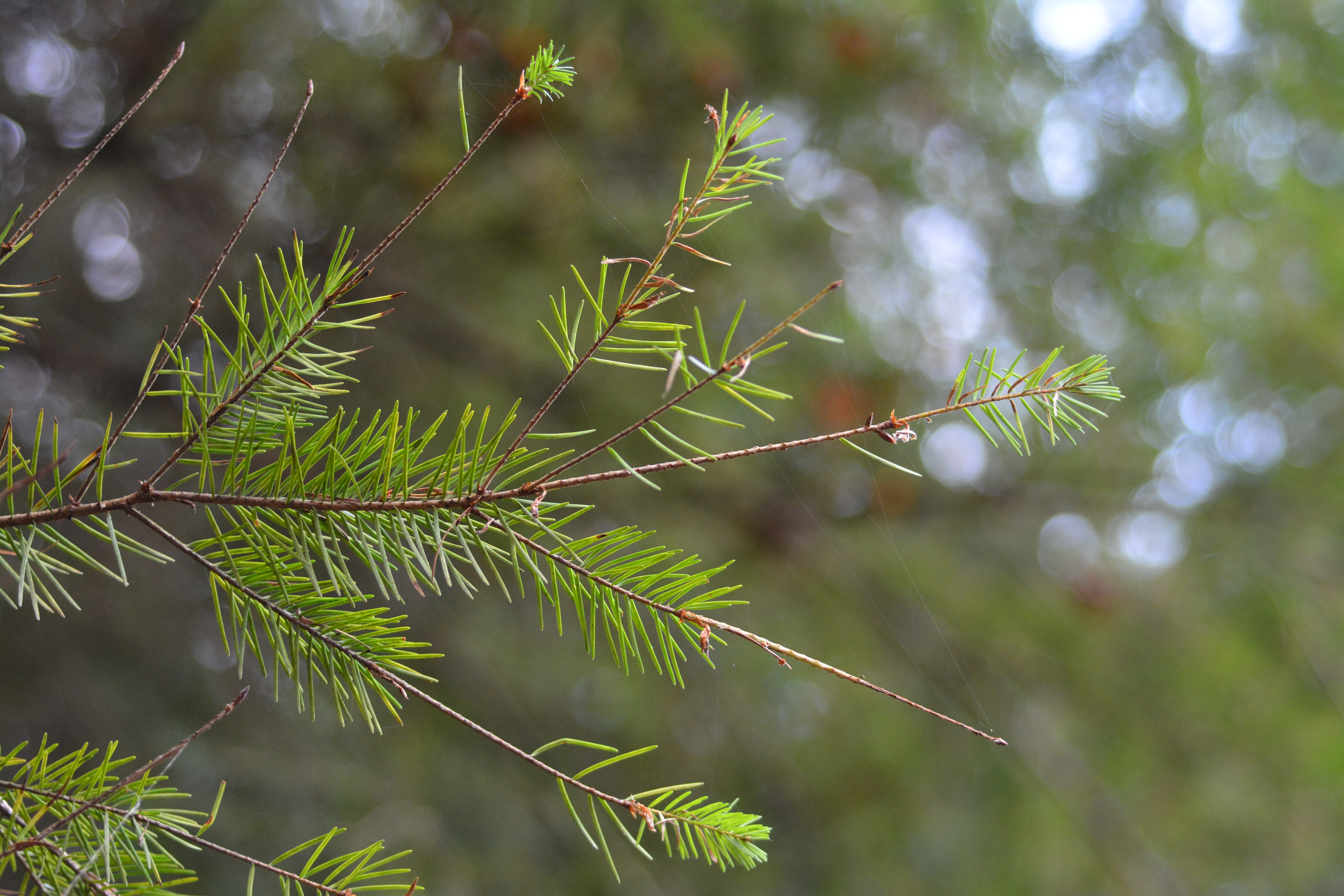 Pseudotsuga menziesii needles drops caused by Contarinia pseudotsugae sensu lato (Diptera : Cecidomyiidae) Location : Belgium